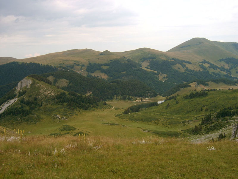 Mont Bjelasica (Monténégro)